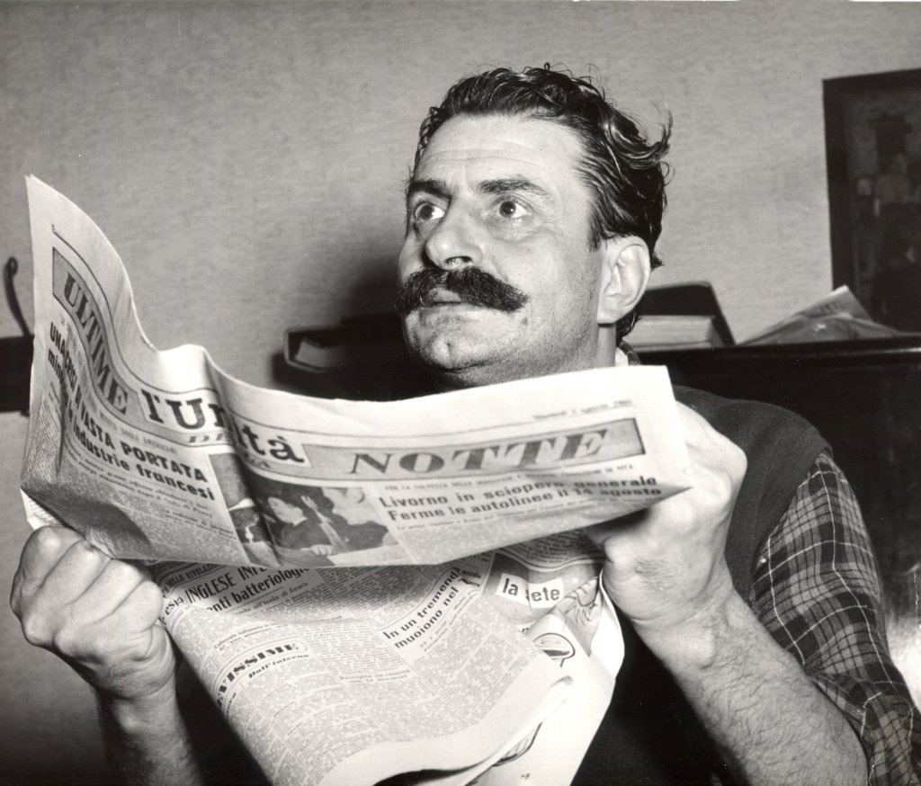 Giovannino Guareschi con «l'Unità» tra le mani a Roncole nel 1953.